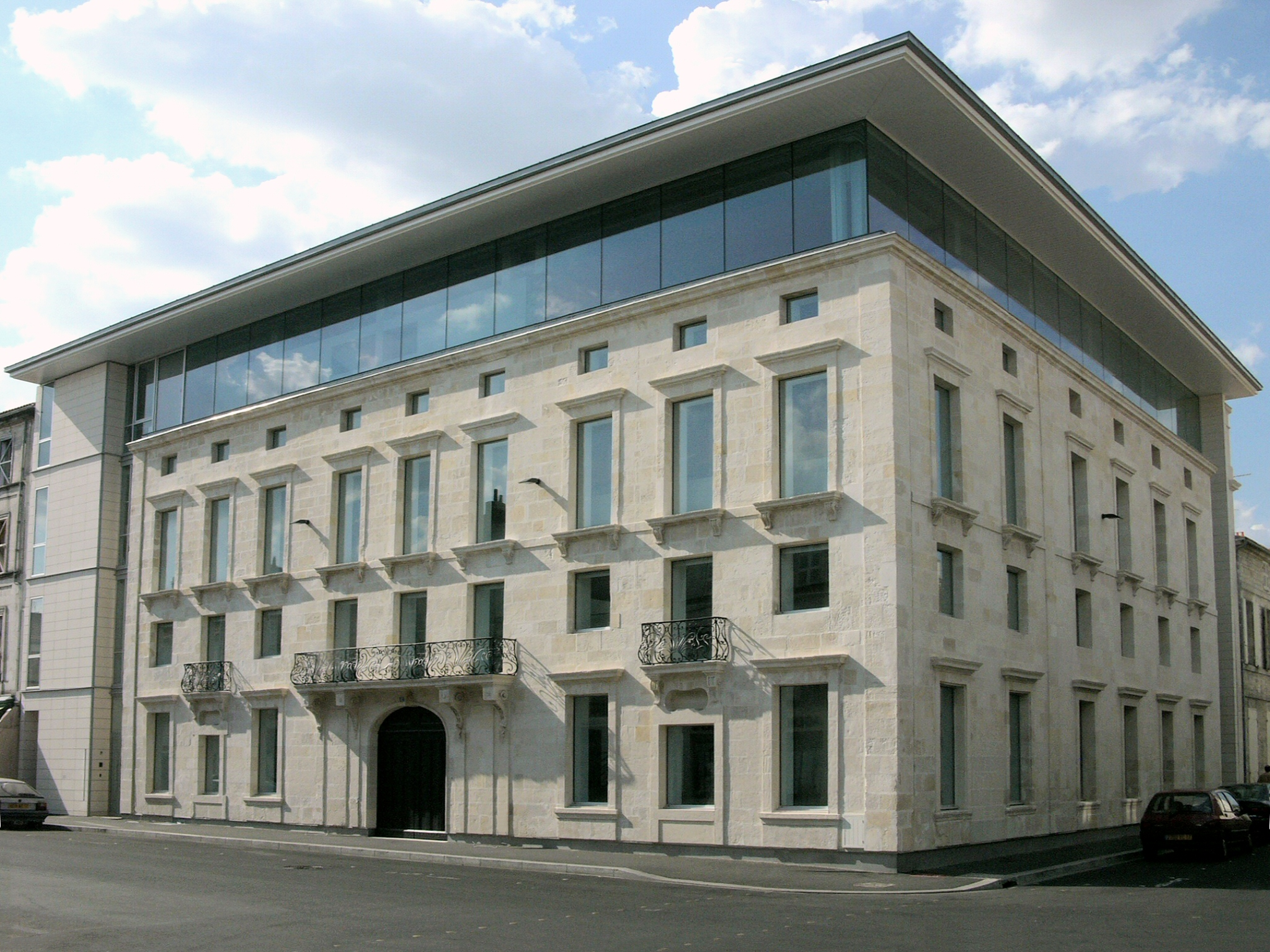 Musée Hèbre de Saint-Clément Rochefort Charente-Maritime France